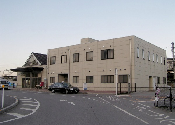 米原駅